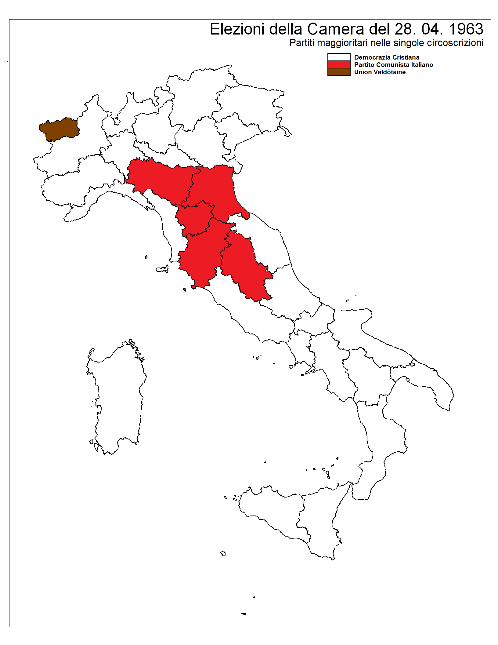 Partiti maggioritari nelle elezioni del 1963 nelle singole circoscrizioni.